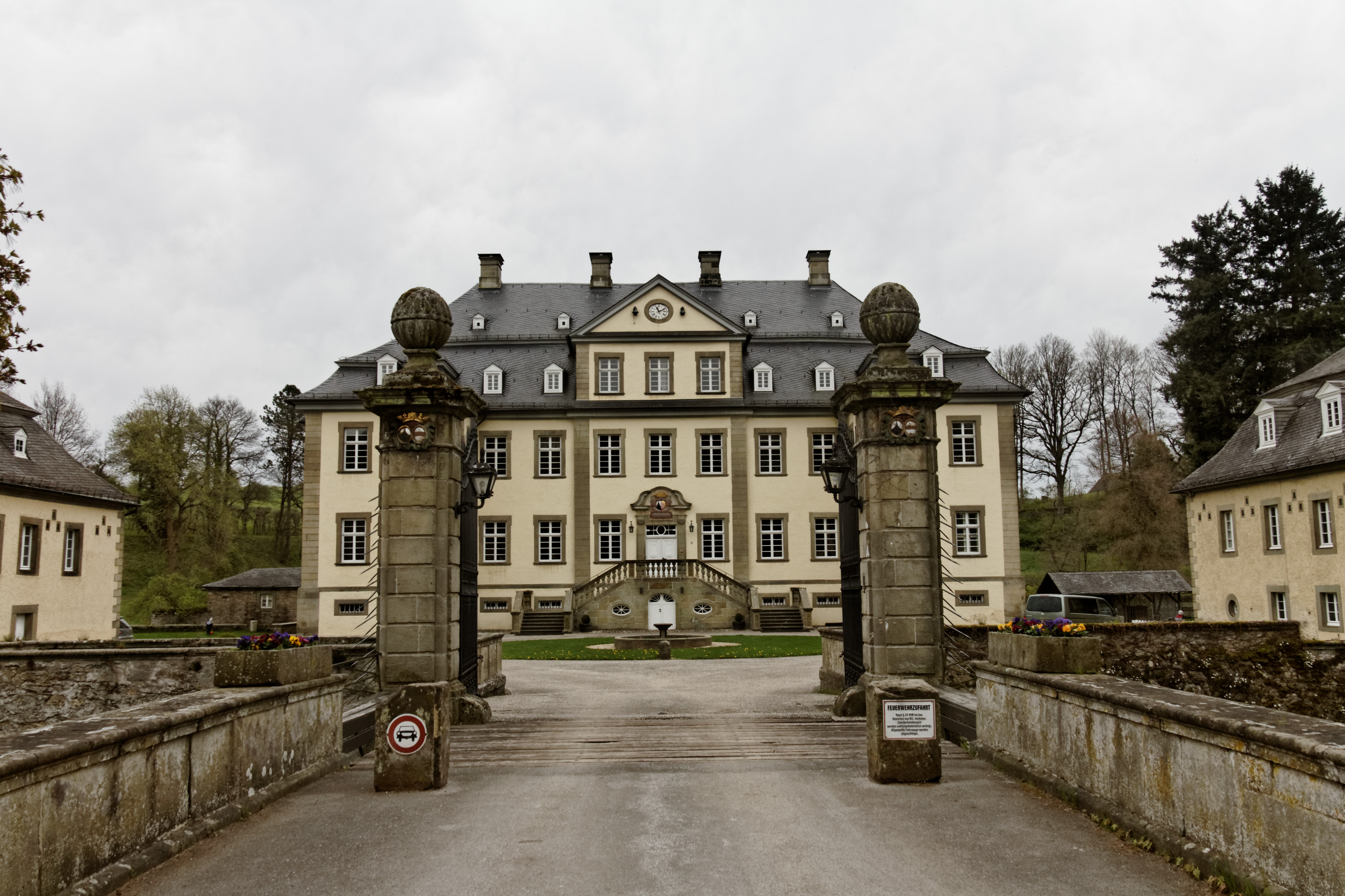 Schloss Körtlinghausen Frontansicht mit Zufahrt